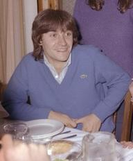 Pedro Uralde in 1981